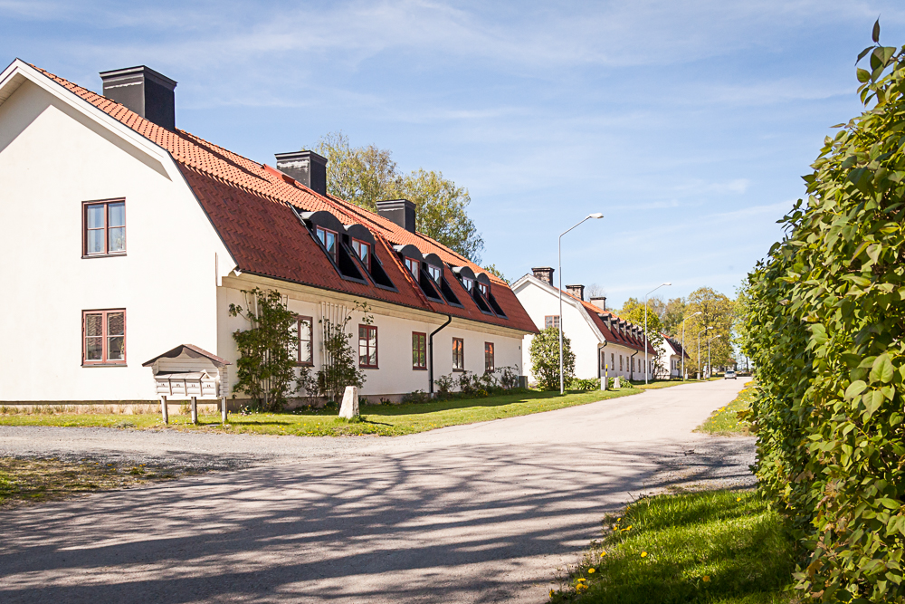 Stenhusgatan i Gimo